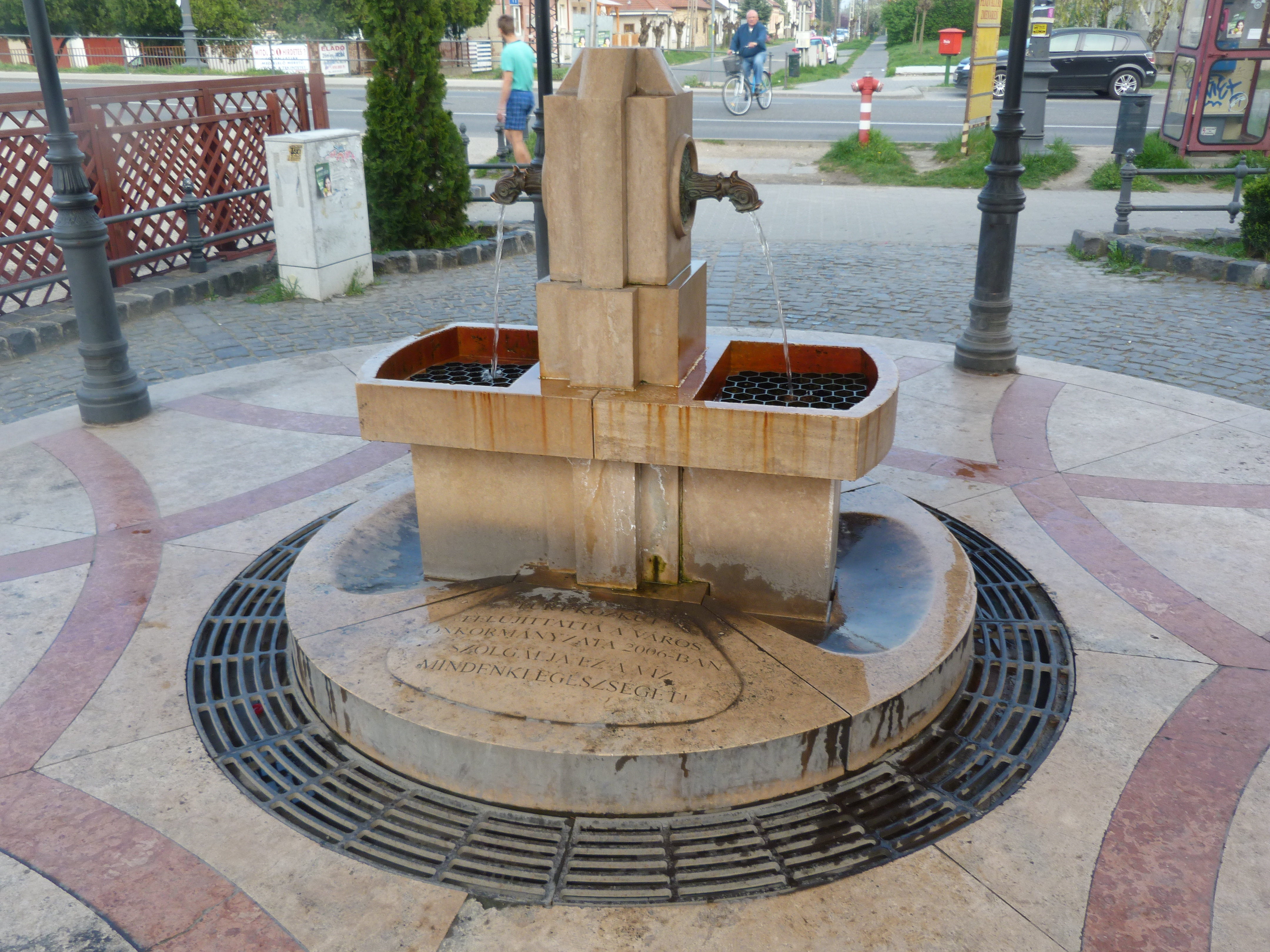 A felvétel 2014. március 31 -én hétfőn készült Komáromban. Artézi kút. ©© Derzsi Elekes Andor, Budapest, 2014, You are authorised to use these photos and vids under Creative Commons – even for commercial, for profit purposes. Photos must be attributed to Derzsi Elekes Andor. All of the photos and vids in the Metapolisz DVD line are under Creative Commons and can be used even for commercial – for profit – purposes. Recommended Citation Derzsi Elekes Andor: Metapolisz DVD line